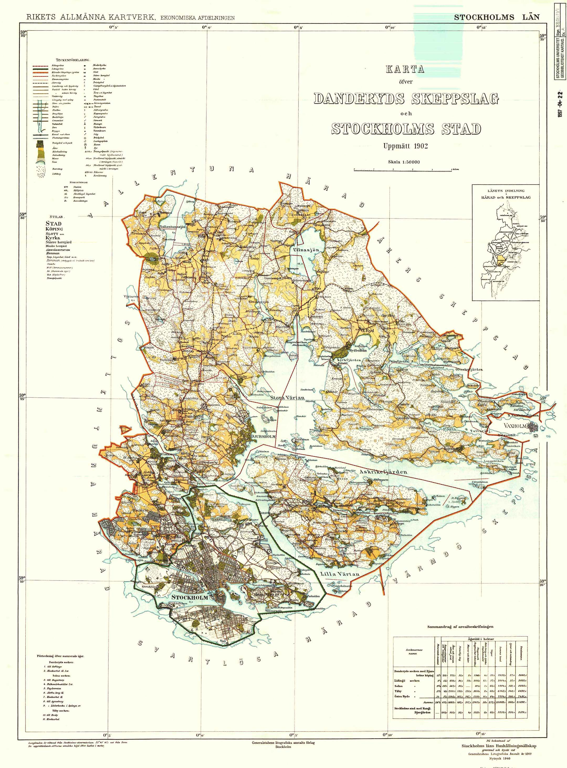 Skeppslagen år 1902.